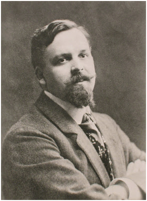 Émile Chénin dit Émile Moselly (1870-1918), écrivain français.